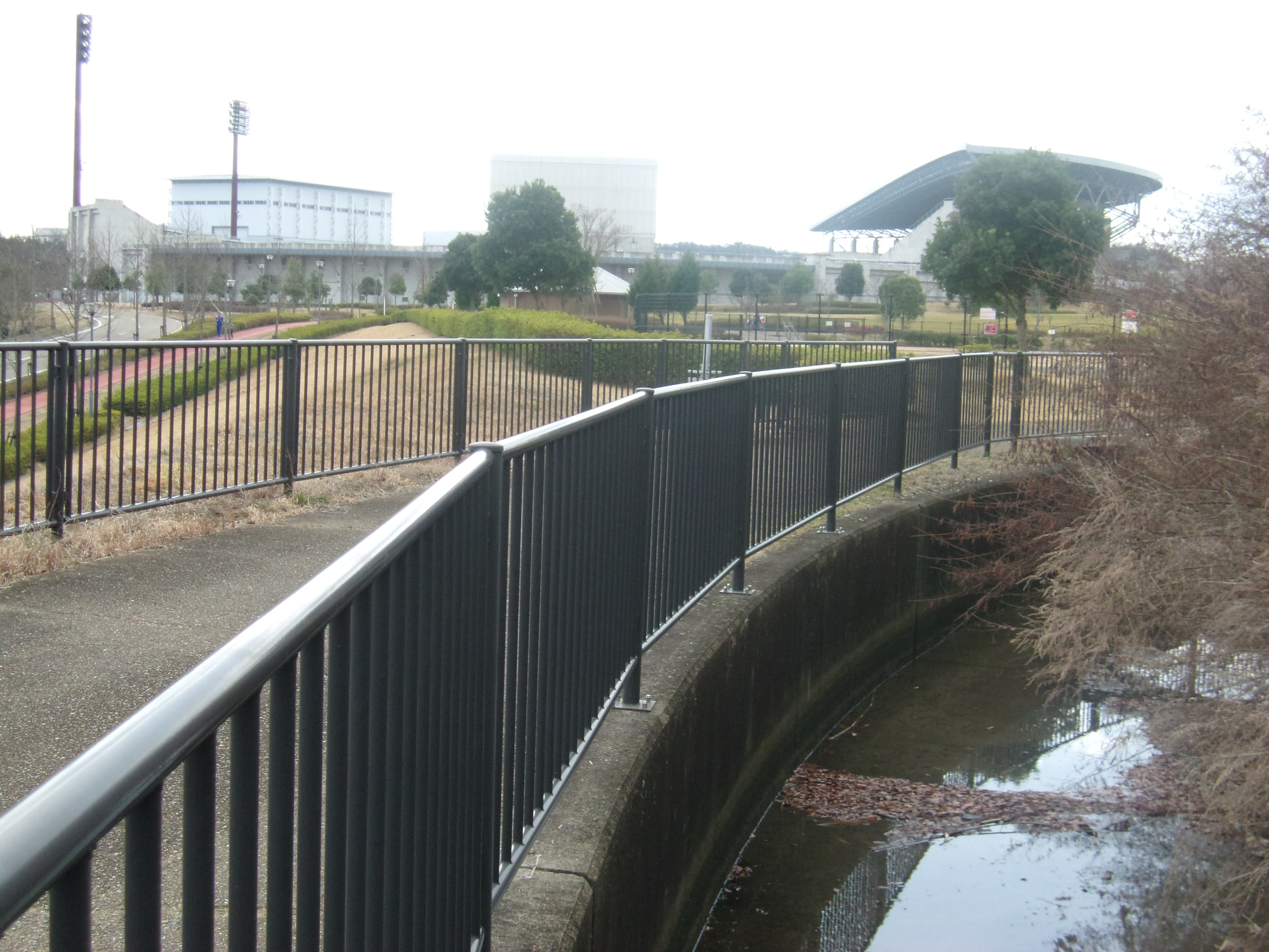 三木市総合防災公園内を流れる淡河疎水